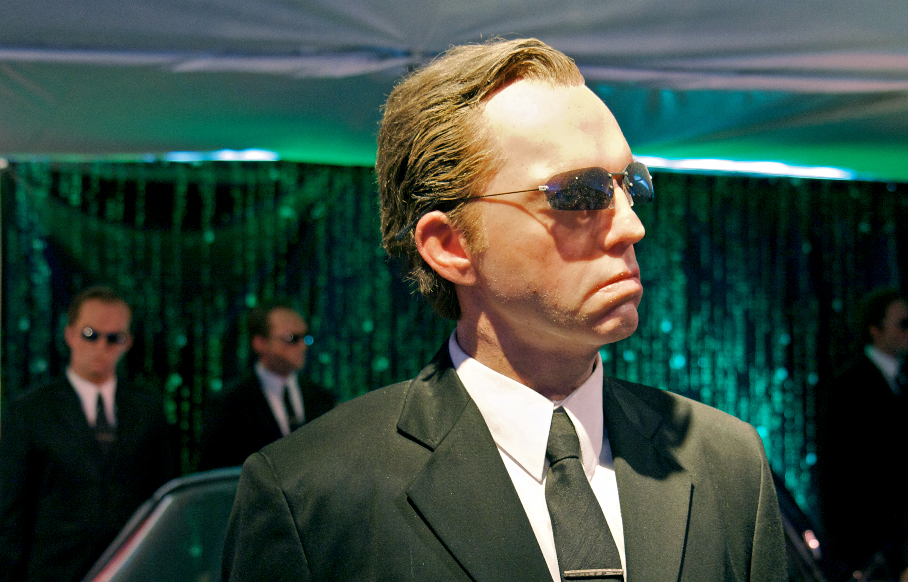 Un des mannequins de l'agent Smith apparaissant dans la série de films Matrix.